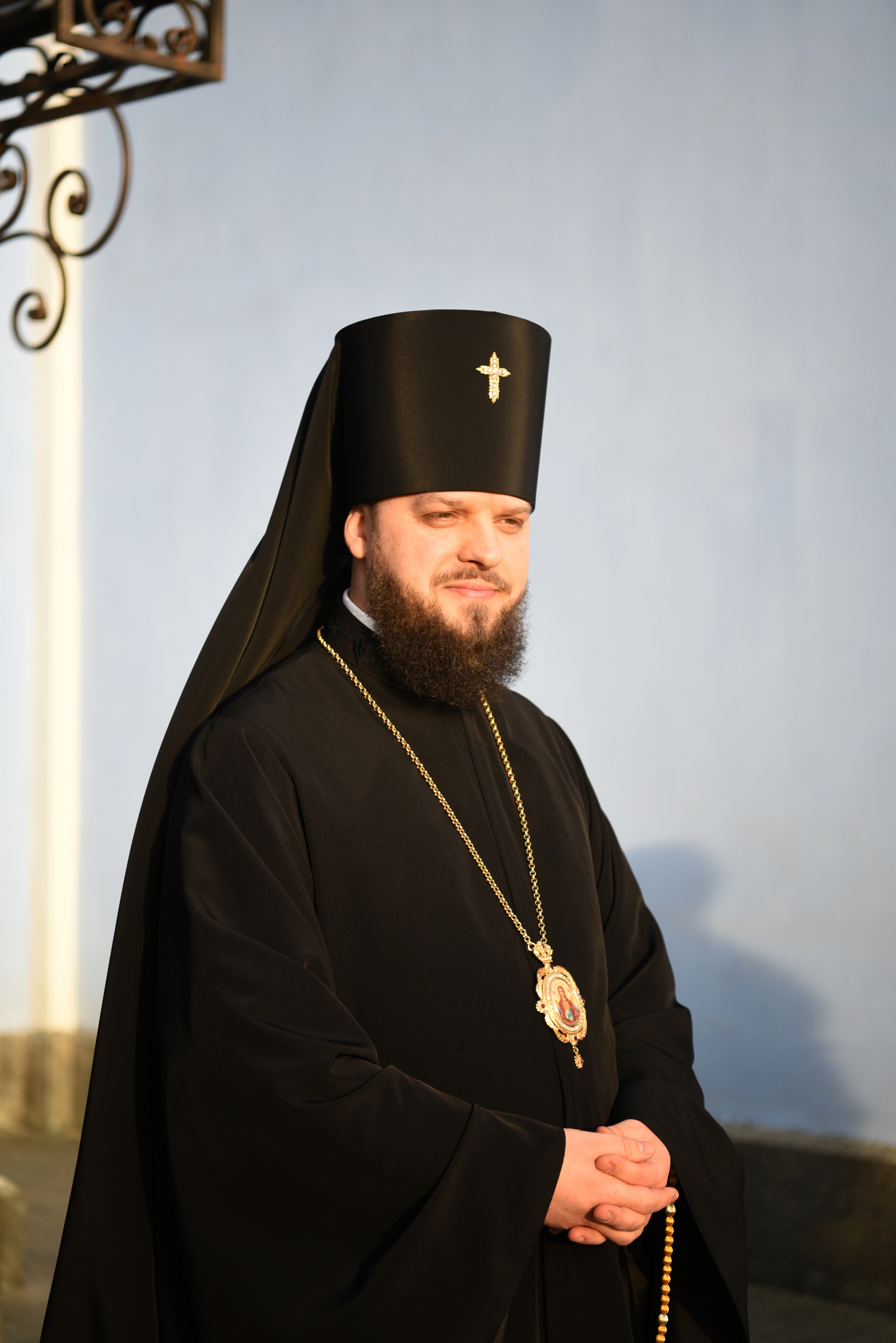 Архієпископ Вишгородський Агапіт (Гуменюк)